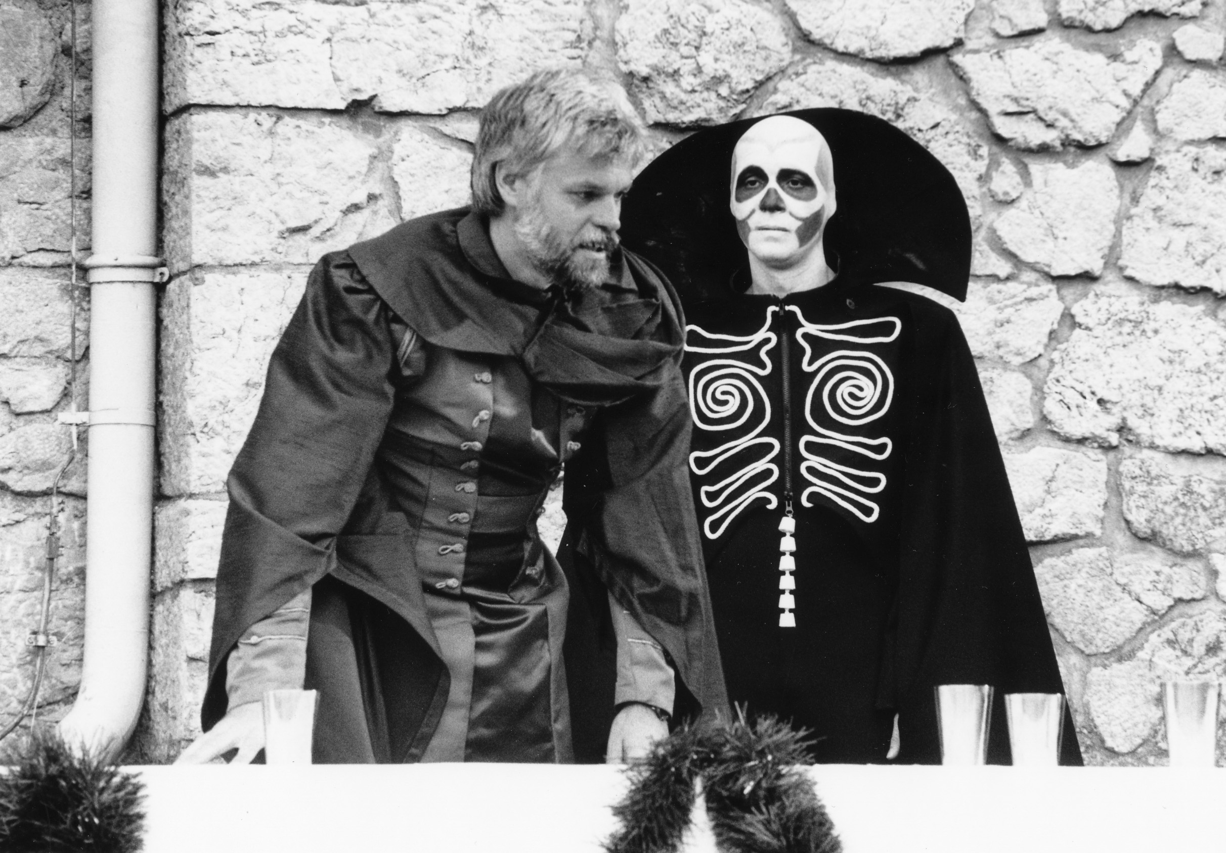 Karl-Theater: Szene aus "Jedermann"